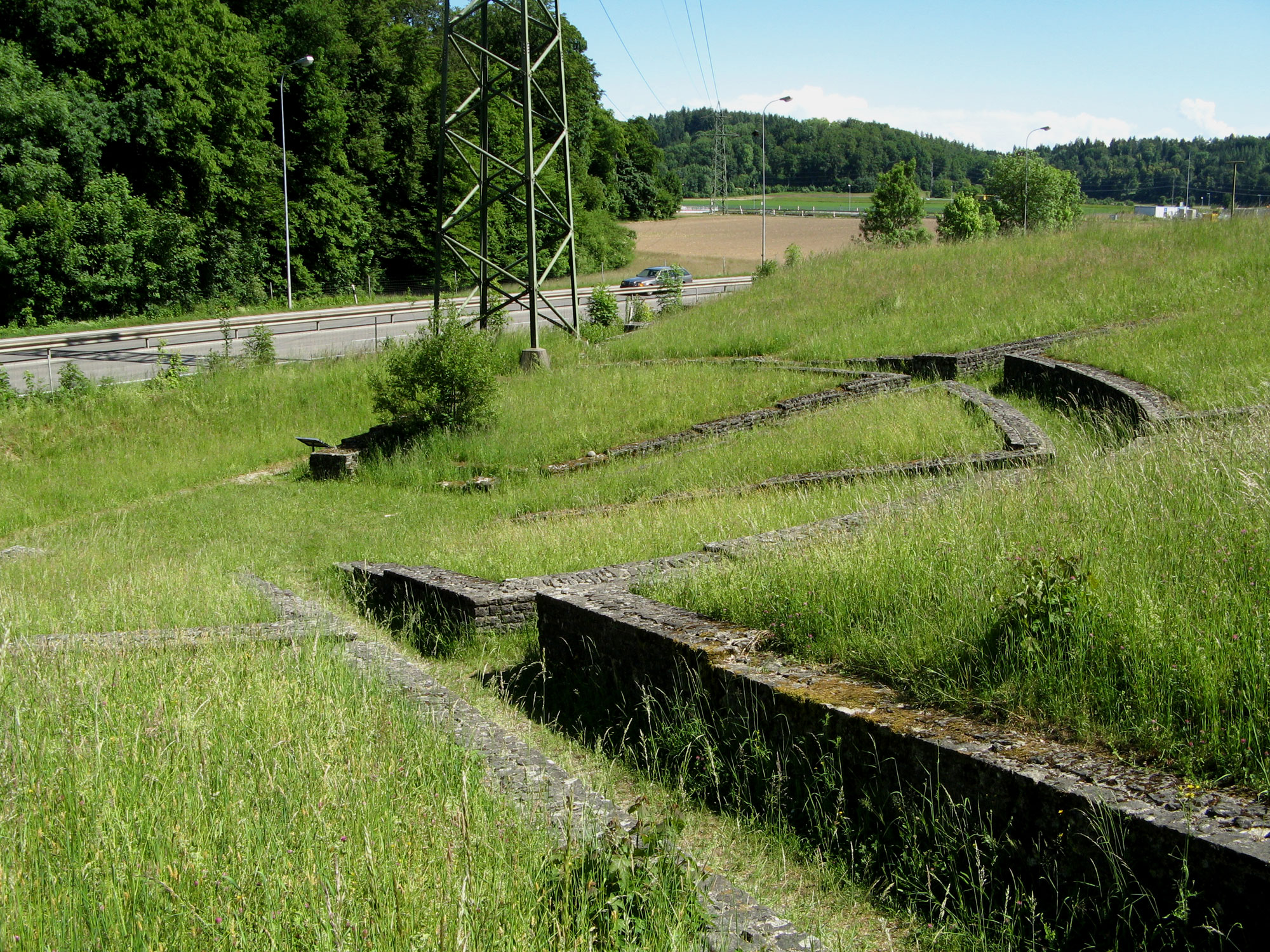 Römisches Theater "Lindfeld" bei Lenzburg